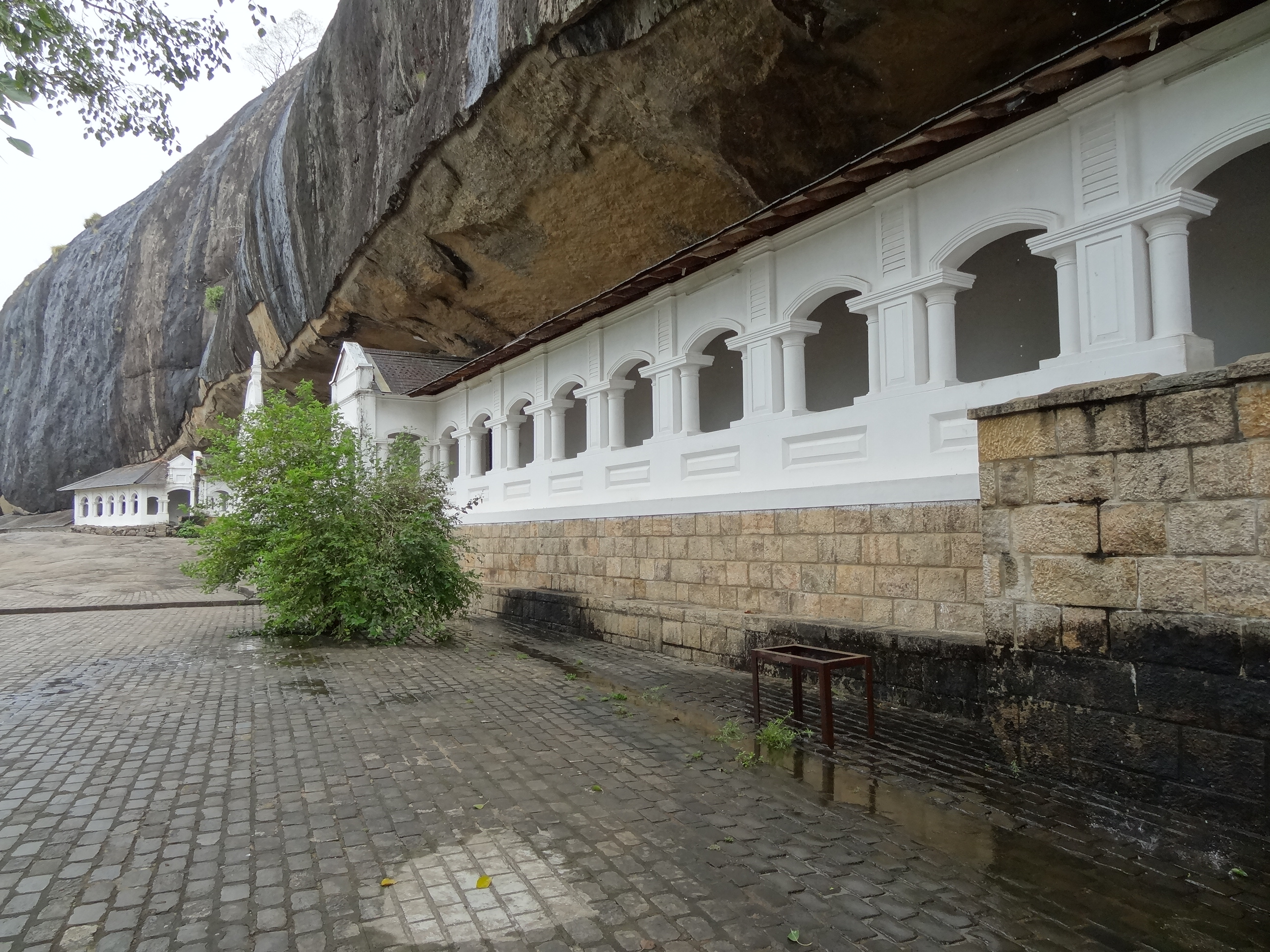 Exterior of Dambulla cave temple